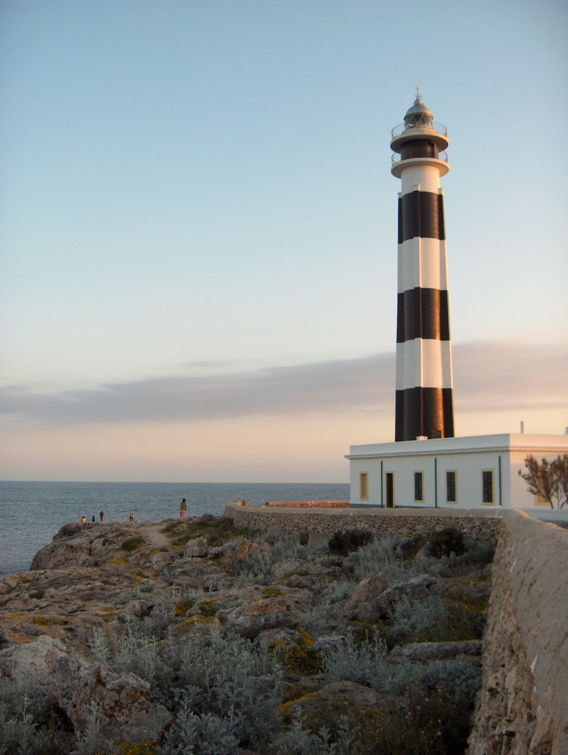 Faro de Artrutx.